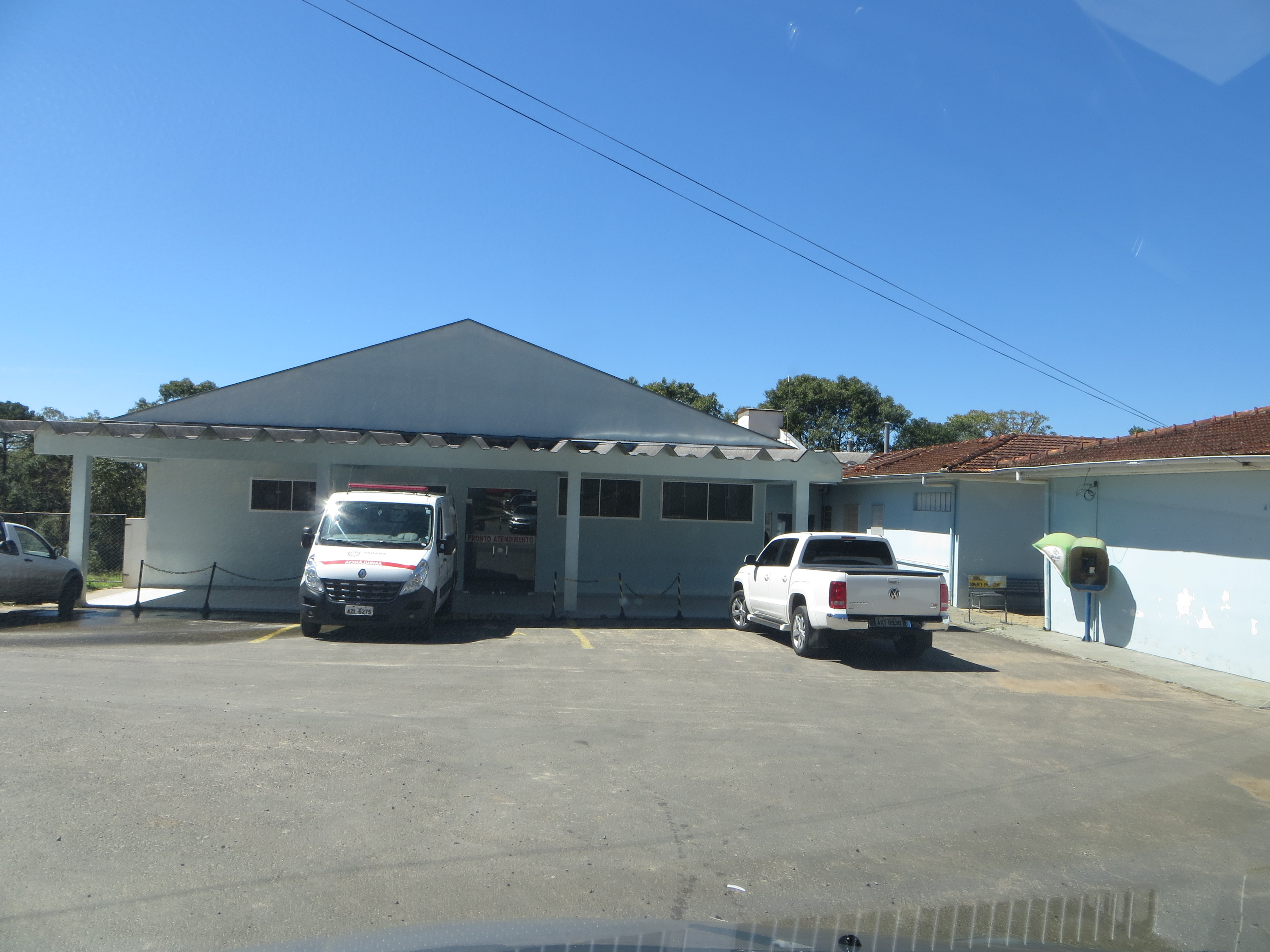 Hospital e Maternidade Imaculada Conceição, em São João do Triunfo, estado brasileiro do Paraná, região sul do país.